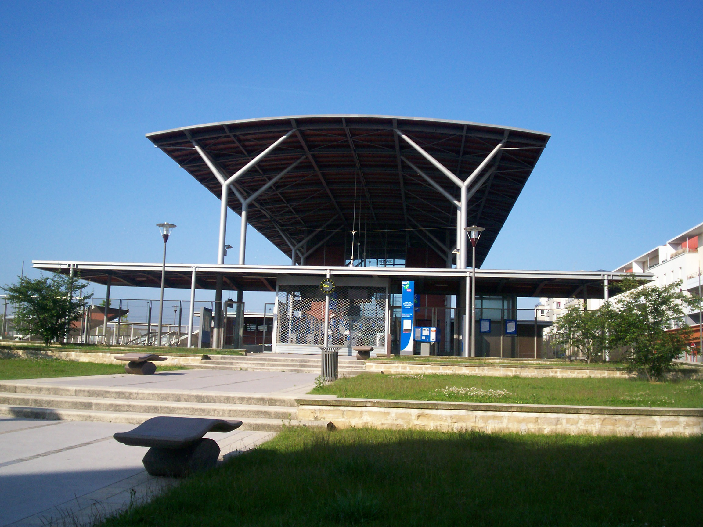 Gare de Saint-Ouen-l'Aumône - Liesse